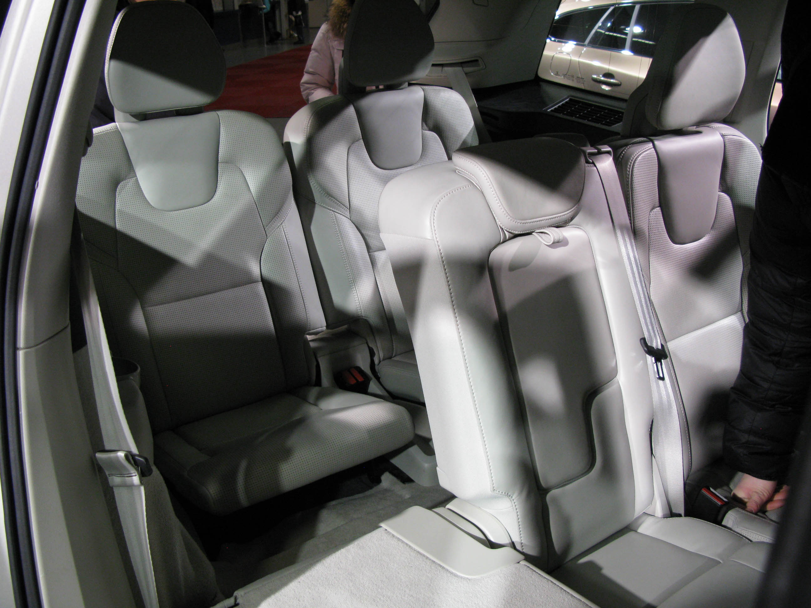 Volvo XC90 II